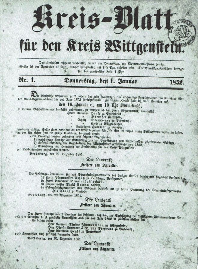 Scan des Kreisblatts für den Kreis Wittgenstein 1. Januar 1852